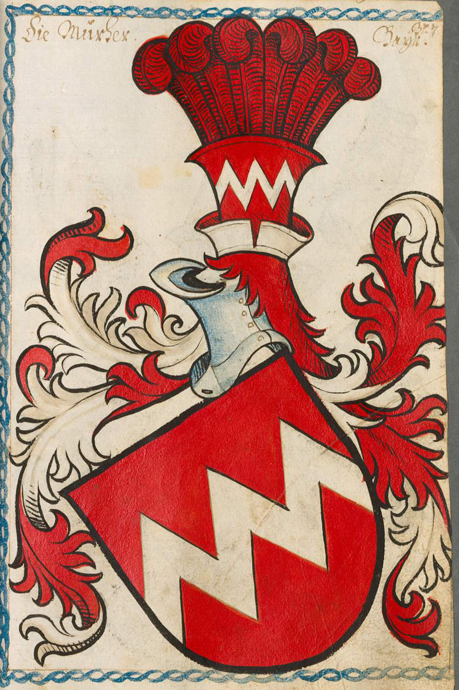 Scheibler'sches Wappenbuch , älterer Teil; Seite 327 die Mürher Bayern